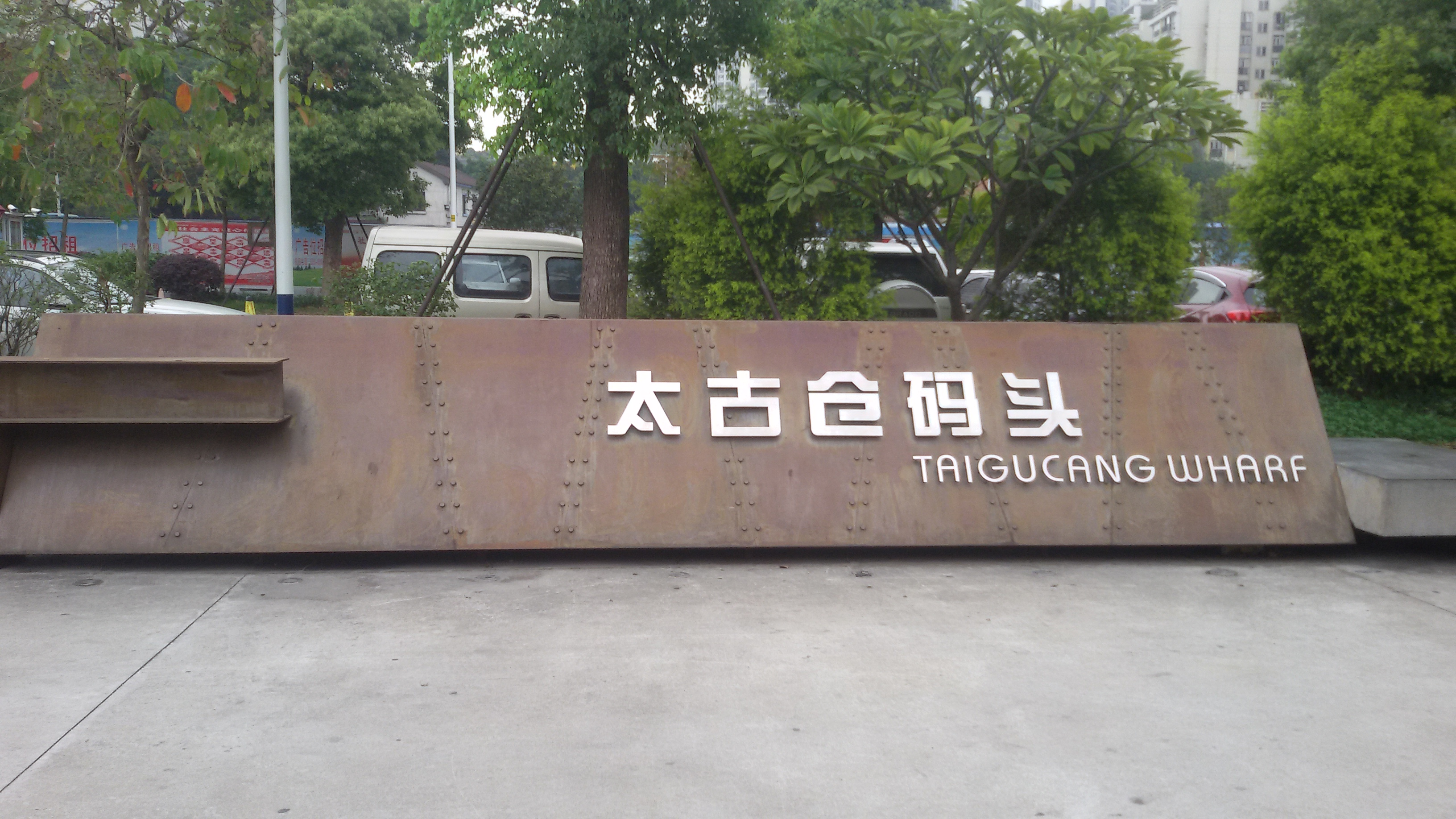 粵語: 太古仓码头嘅名